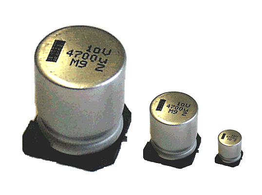 SMD-V-Chips, Aluminium-Elektrolytkondensatoren